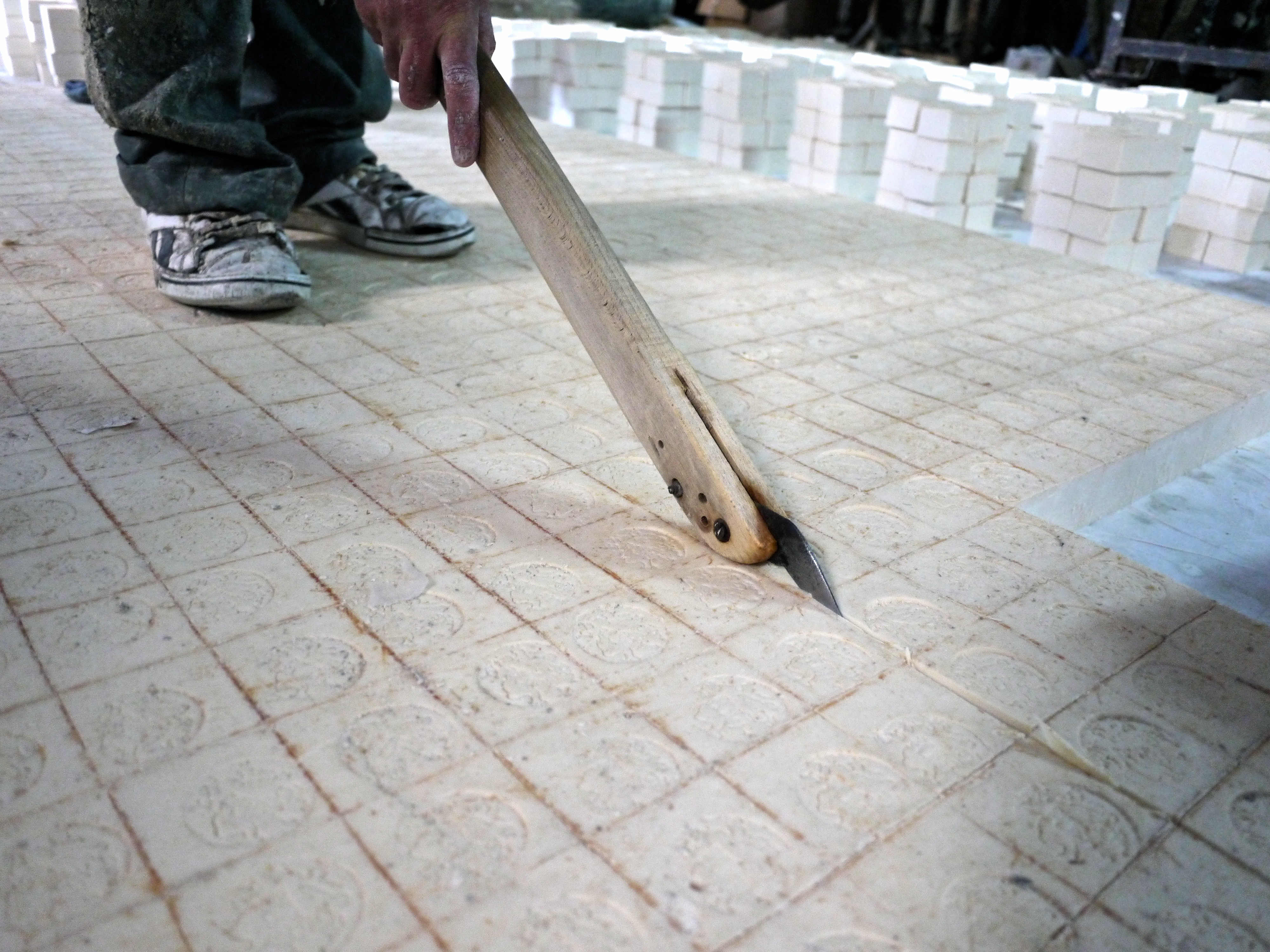 Una delle ultime fabbriche di sapone di Nablus.